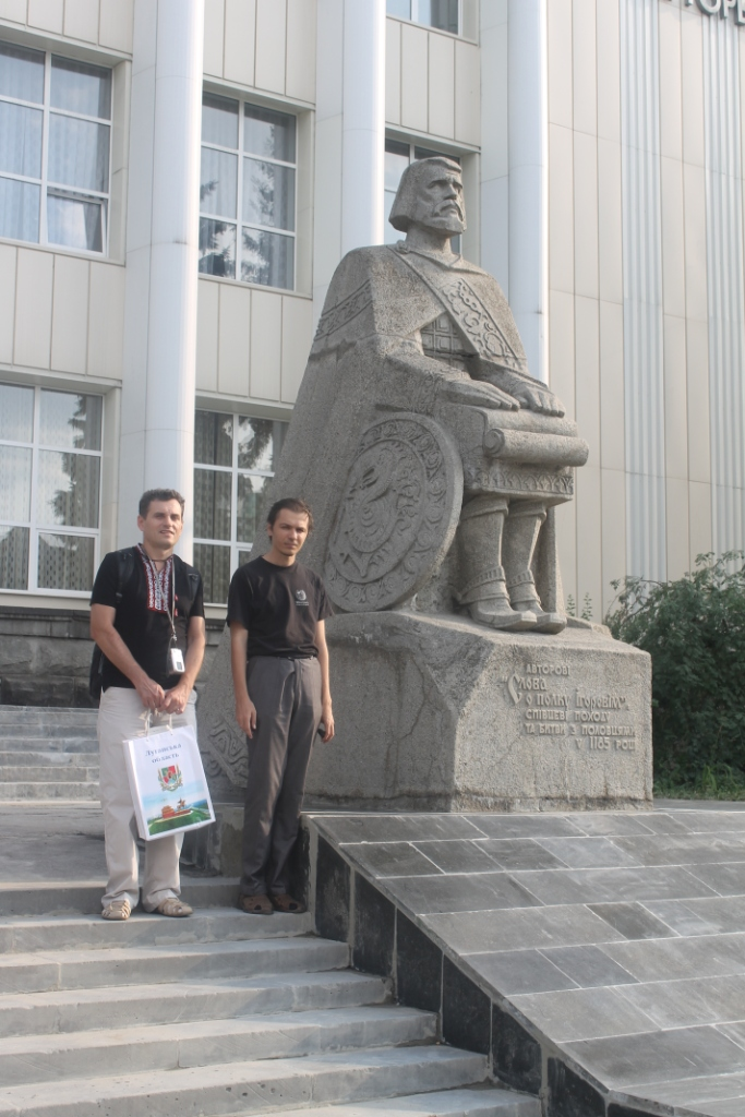 Yakudza i A1 біля Луганської бібліотеки